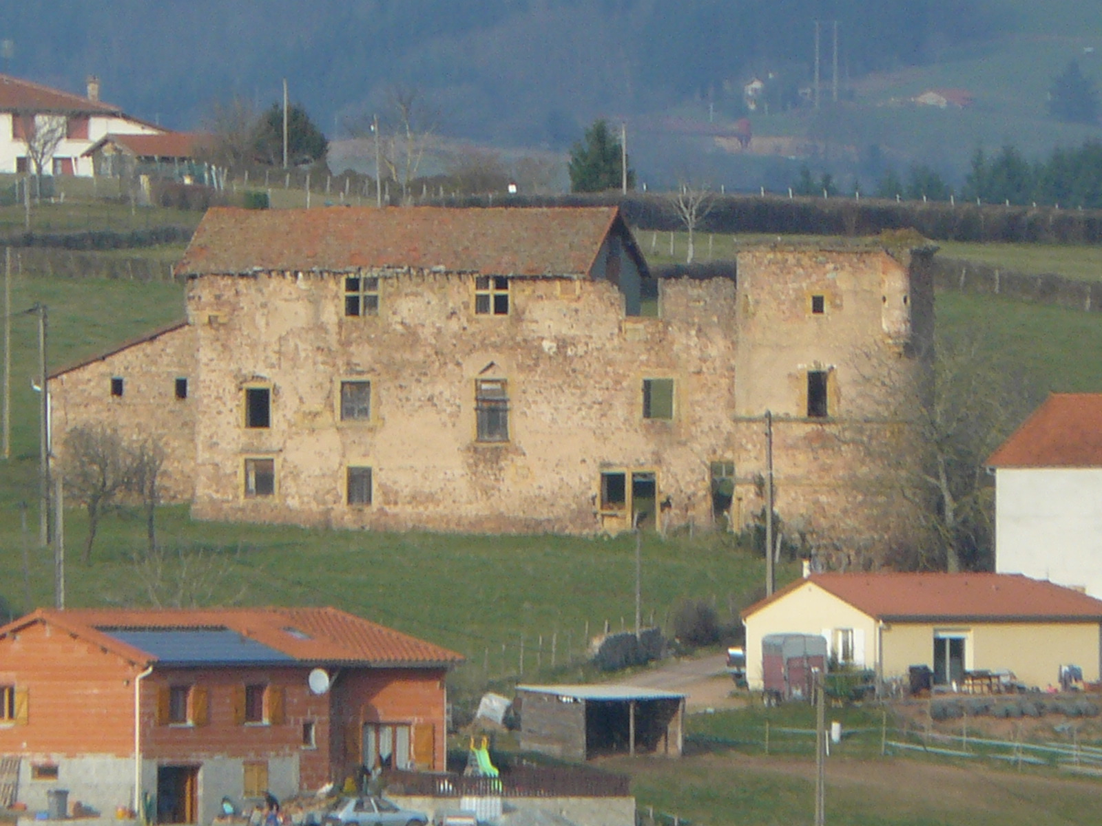 Gros plan du château.